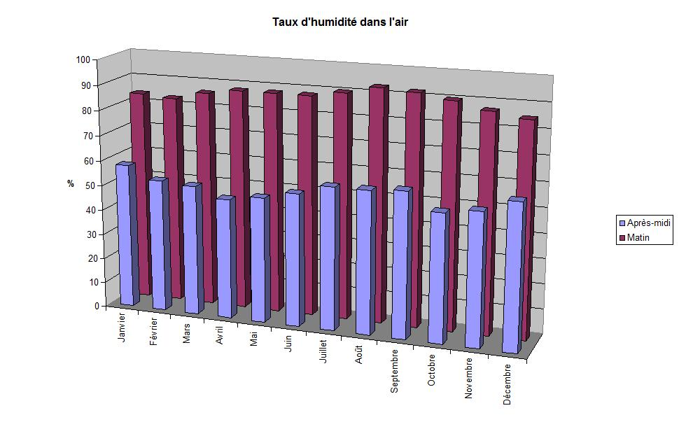 Taux d'humidité dans l'atmosphère à Dudley (Géorgie, Etats-Unis), le matin et l'après-midi